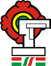 Toponimio correspondiente al Municipio de Valle de Chalco Solidaridad, "Las Casas a lado del cerro construidas con solidaridad"